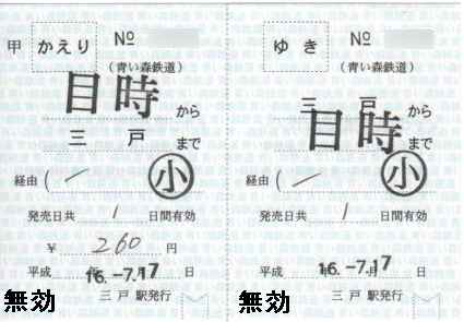 補充往復券(青い森鉄道三戸駅発行)